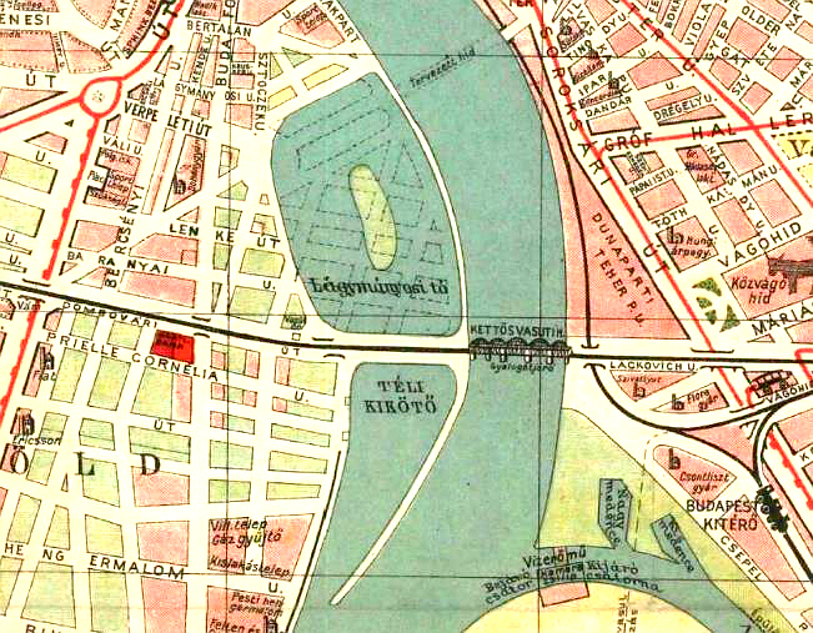 A lágymányosi tó környéke egy 1930-as Nagy Budapest térképen